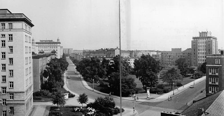 Berlin, Weberwiese, Park, Wohnblocks Zentralbild Voigt 16.10.1963 An der Weberwiese … wurde im Jahre 1952 das erste Hochhaus Berlins fertiggestellt (rechts) . Hier ein Blick auf die Anlage vor dem Hochhaus. Links: die Hildegard-Jadamowitzstrasse mit Wohnbauten der Karl-Marx-Allee. Rechts: die Marchlewskistrasse.